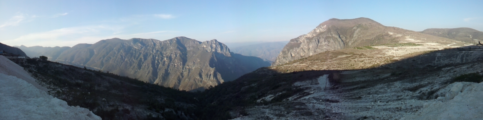 Cerros en Ixmiquilpan, Hidalgo que dan origen a la formación de las Grutas de Tolantongo